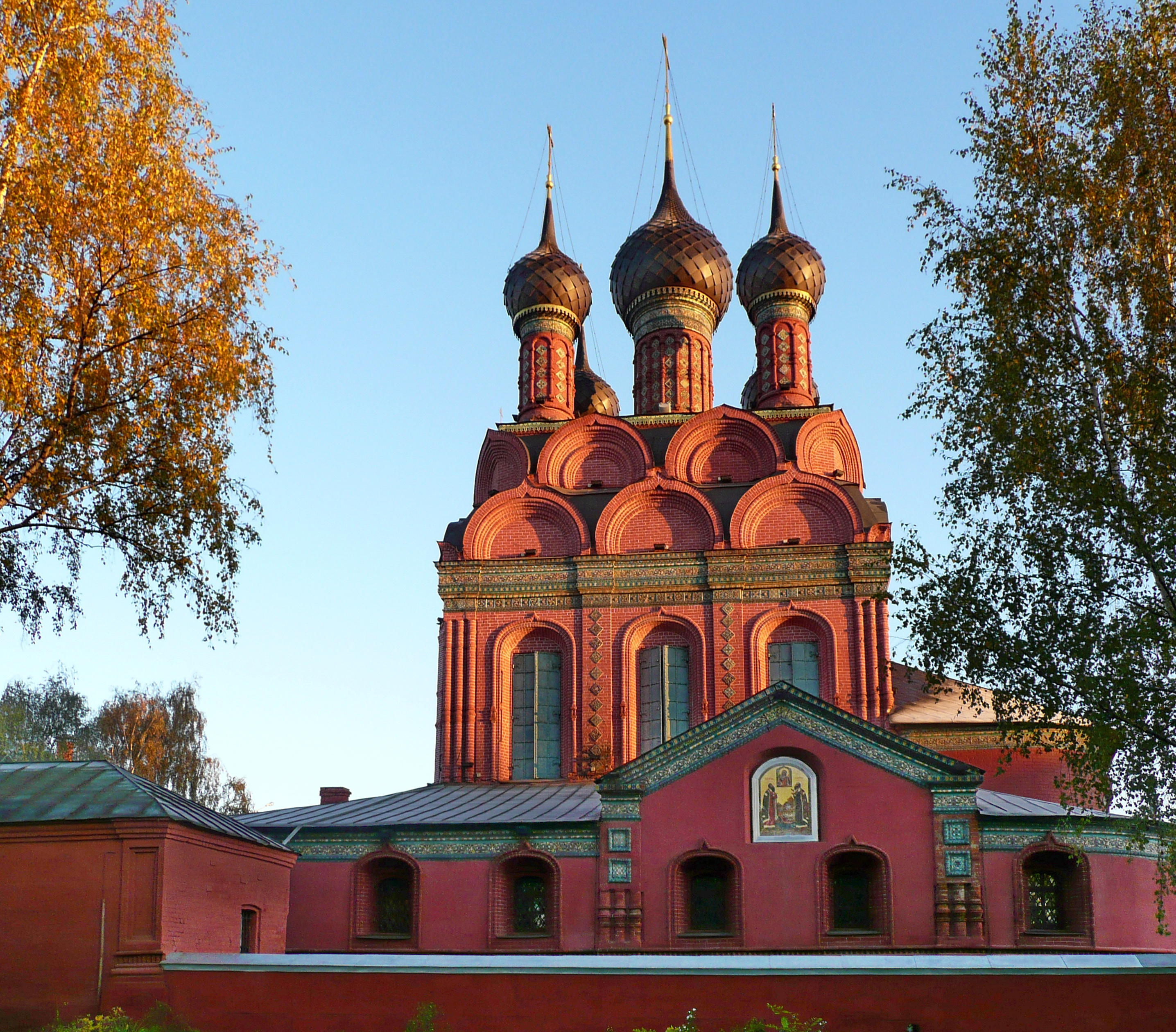 Церковь Богоявления: площадь Богоявленская, Ярославль, Ярославская область